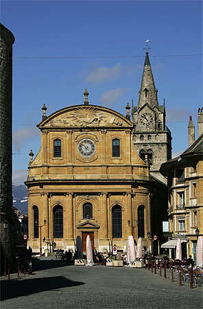 Yverdon: Pfarrkirche (Place Pestalozzi)